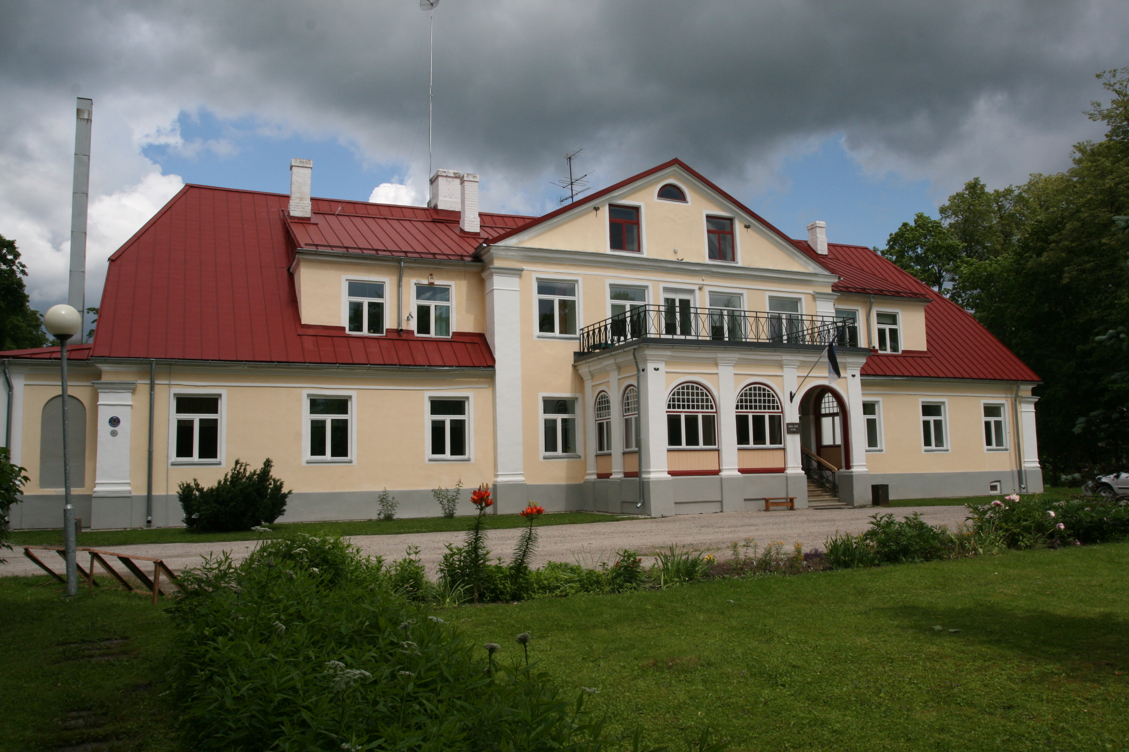 Kaelase mõisa peahoone